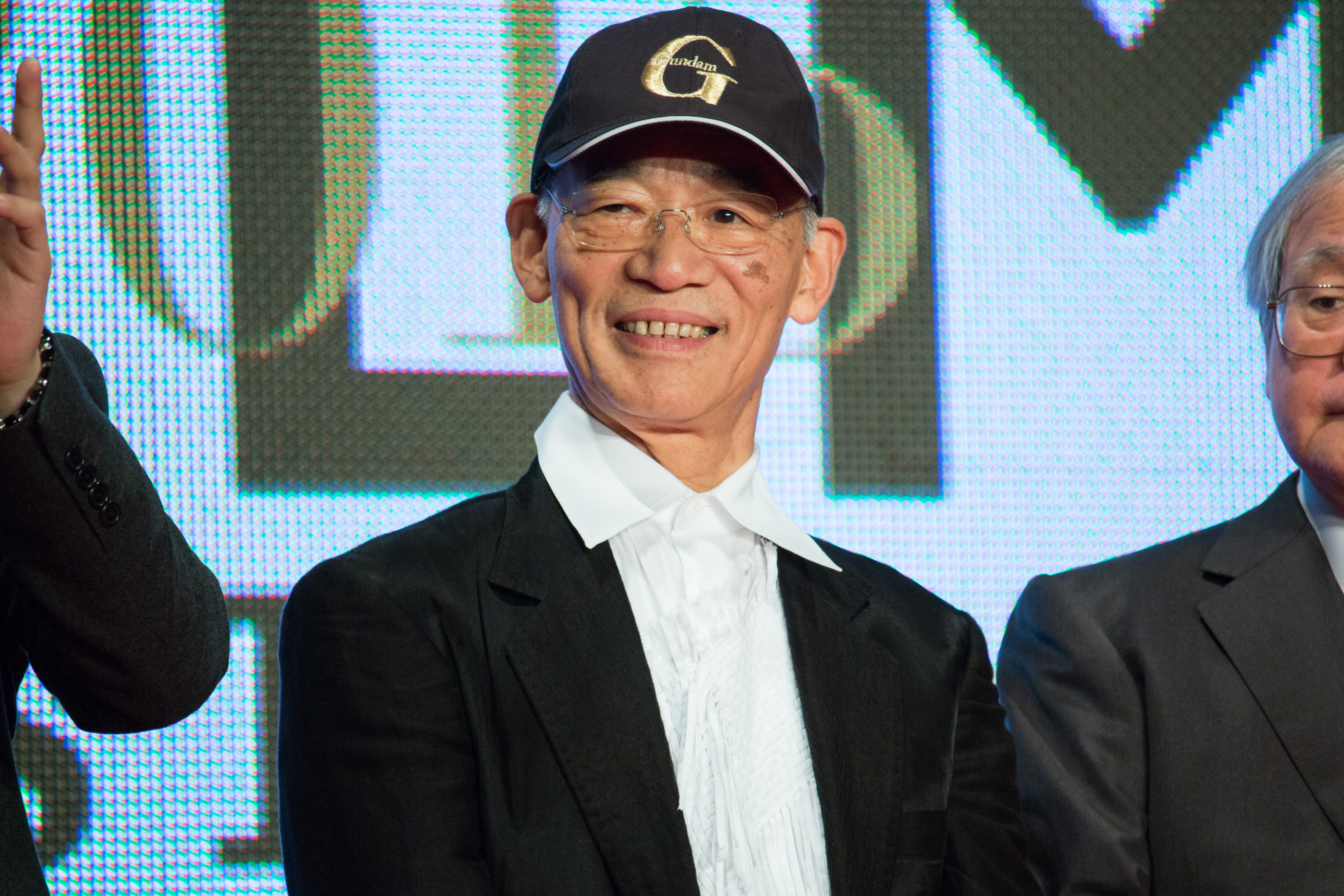 第28回 東京国際映画祭 オープニングセレモニー 富野由悠季 (ガンダムとその世界)